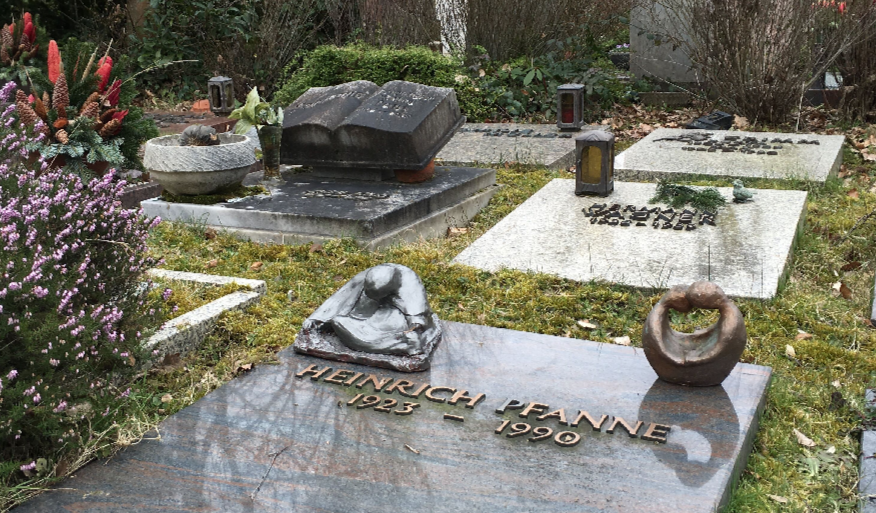 Grab Heinrich Pfanne im Waldfriedhof Dotzheim (Wiesbaden); die beiden Skulpturen sind von seiner am 20. Juni 2018 verstorbenen Frau Gisela Pfanne.